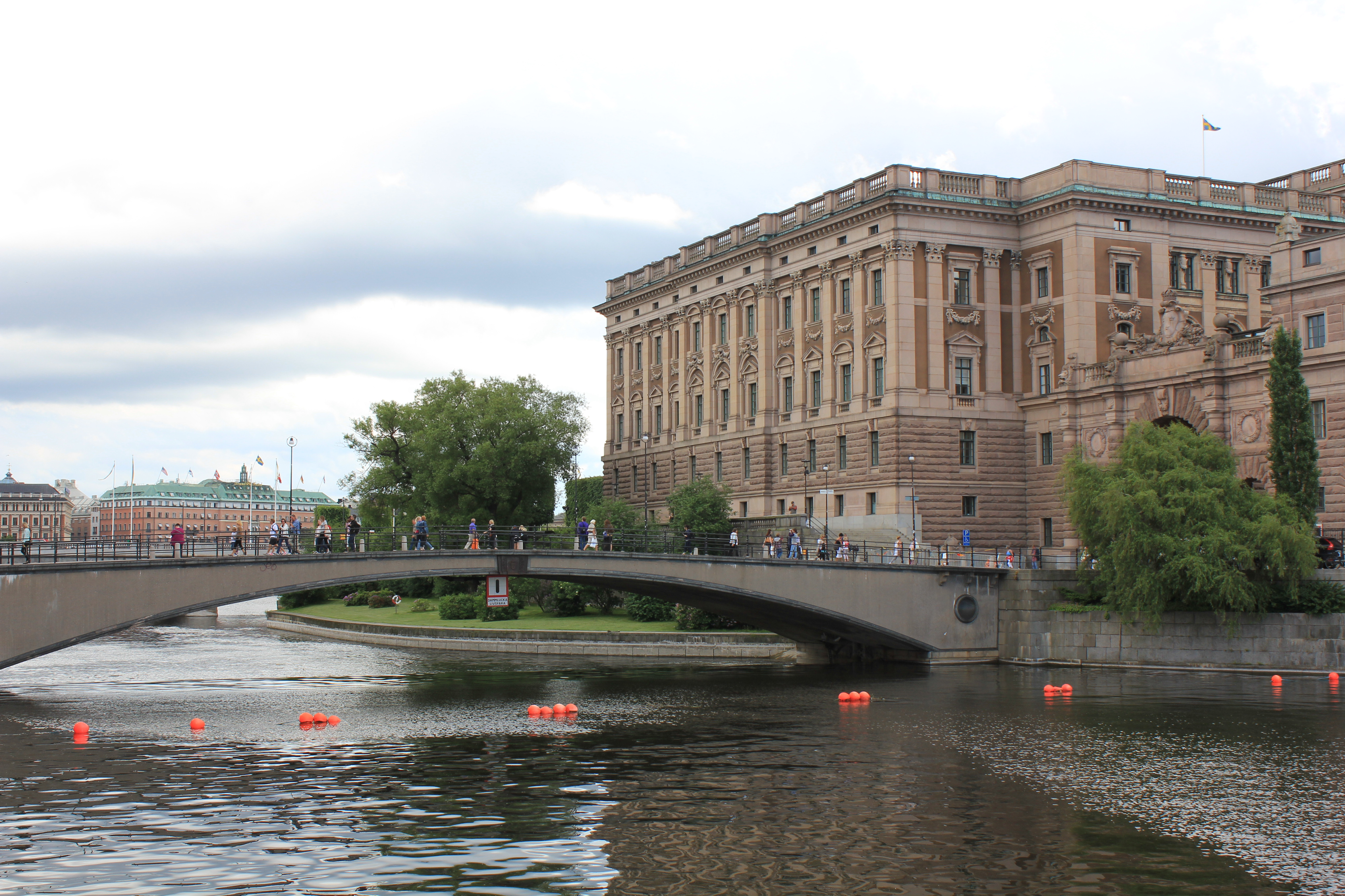 Bru i Stockholm over til Riksdagen.